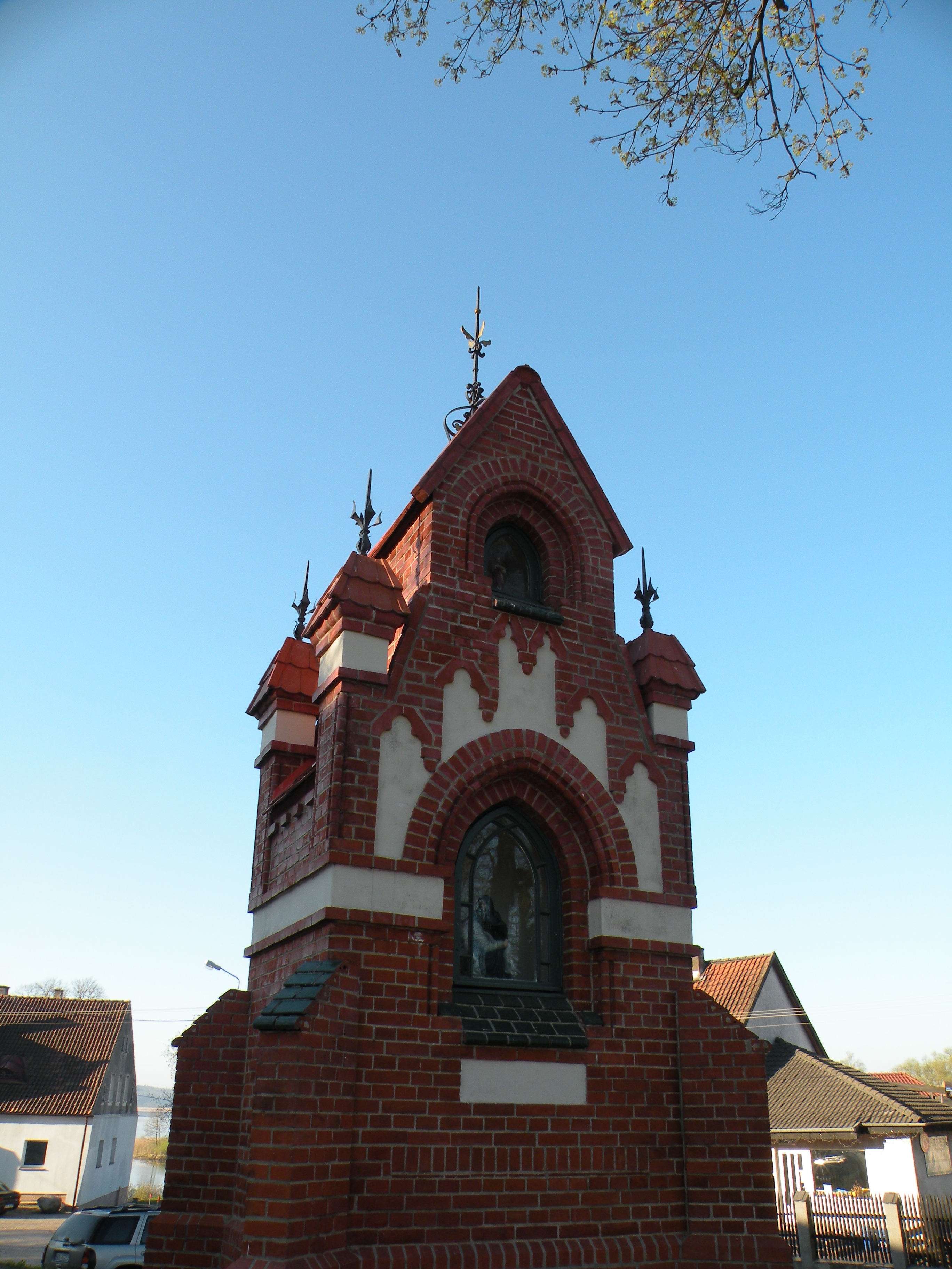 Klebark Wielki, duża kapliczka przed kościołem, widok od frontu